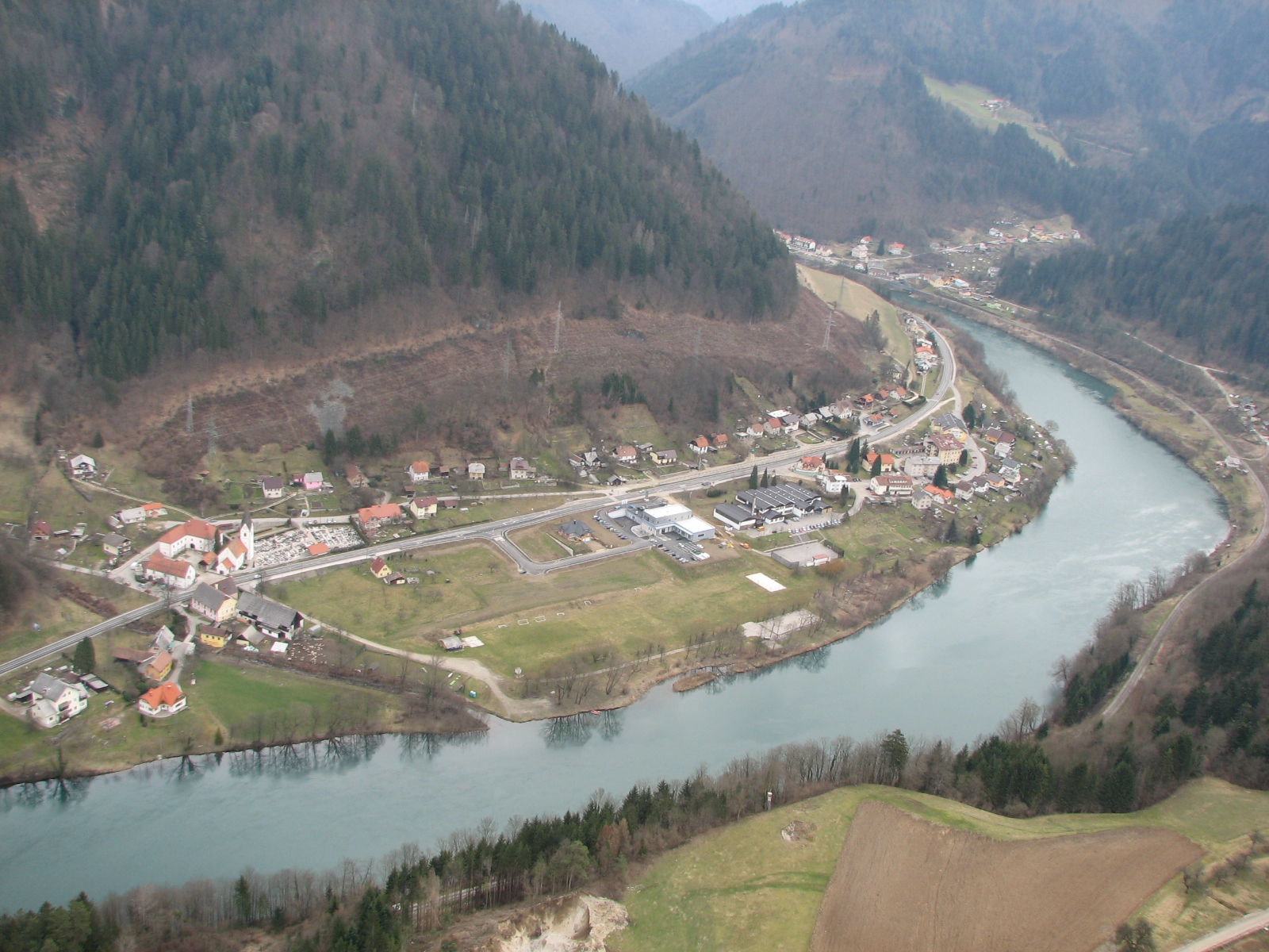 Brezno, vas v občini Podvelka